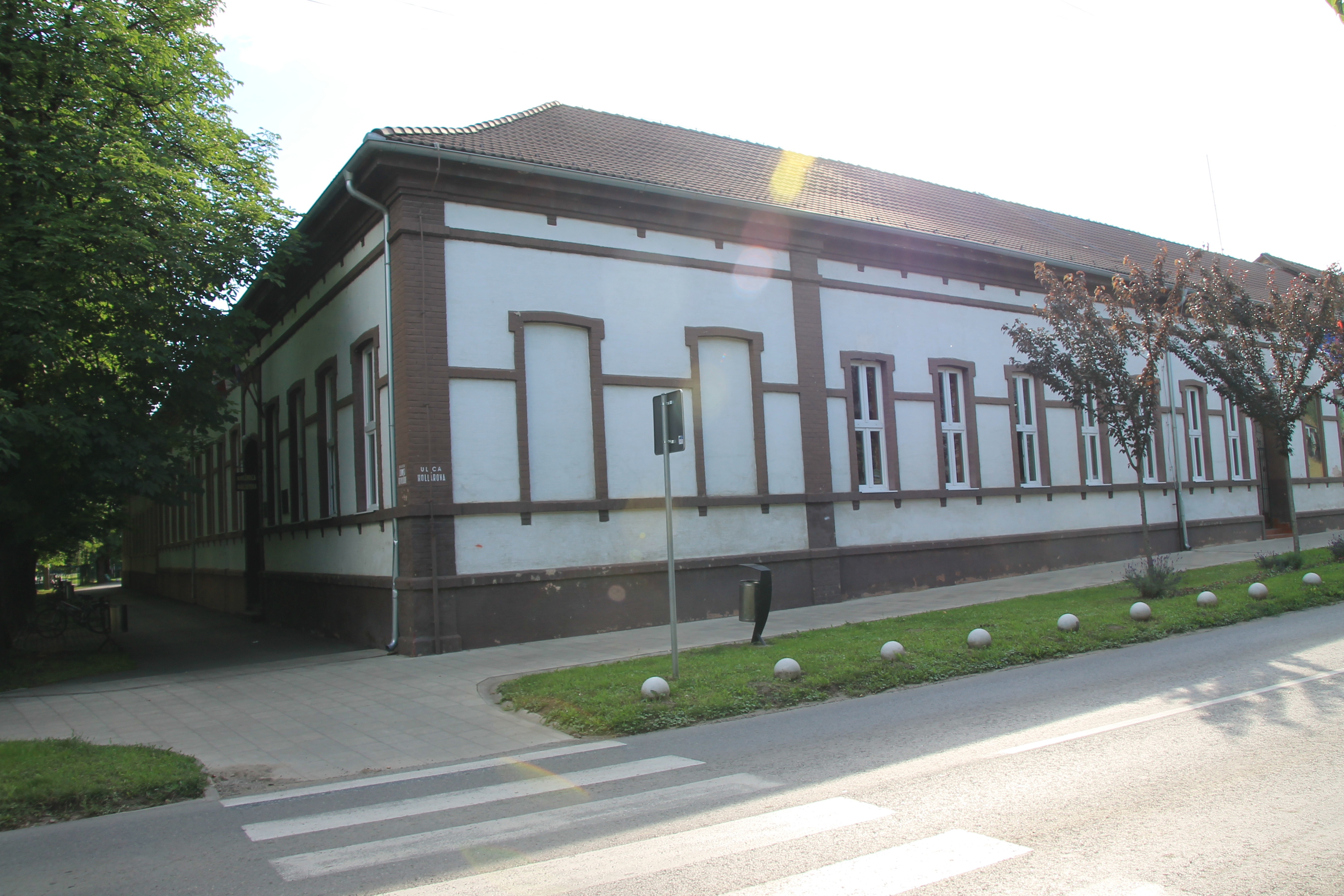 Bački Petrovac